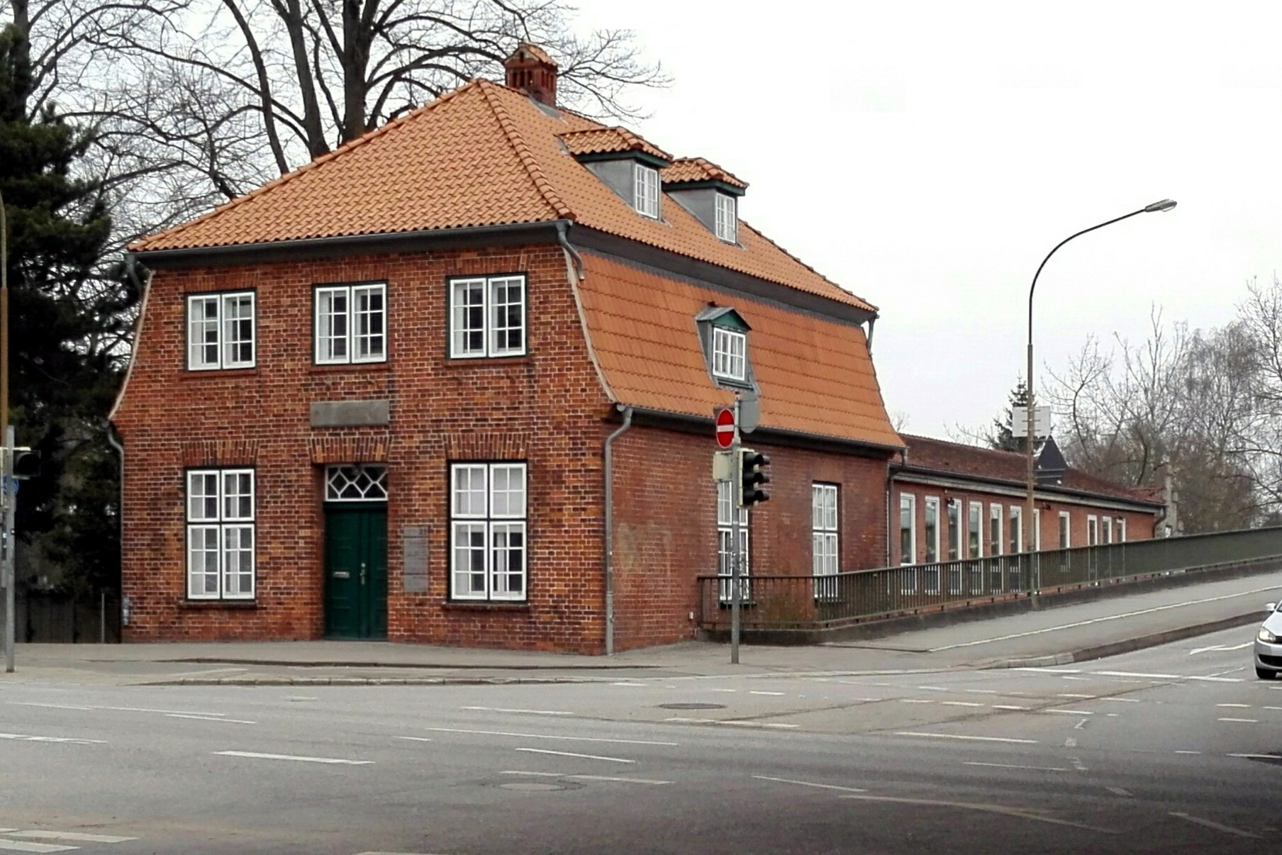 ehemaliges Schulhaus der V. Kleinkinder-SchuleThis is a photograph of an architectural monument.It is on the list of cultural monuments of Lübeck